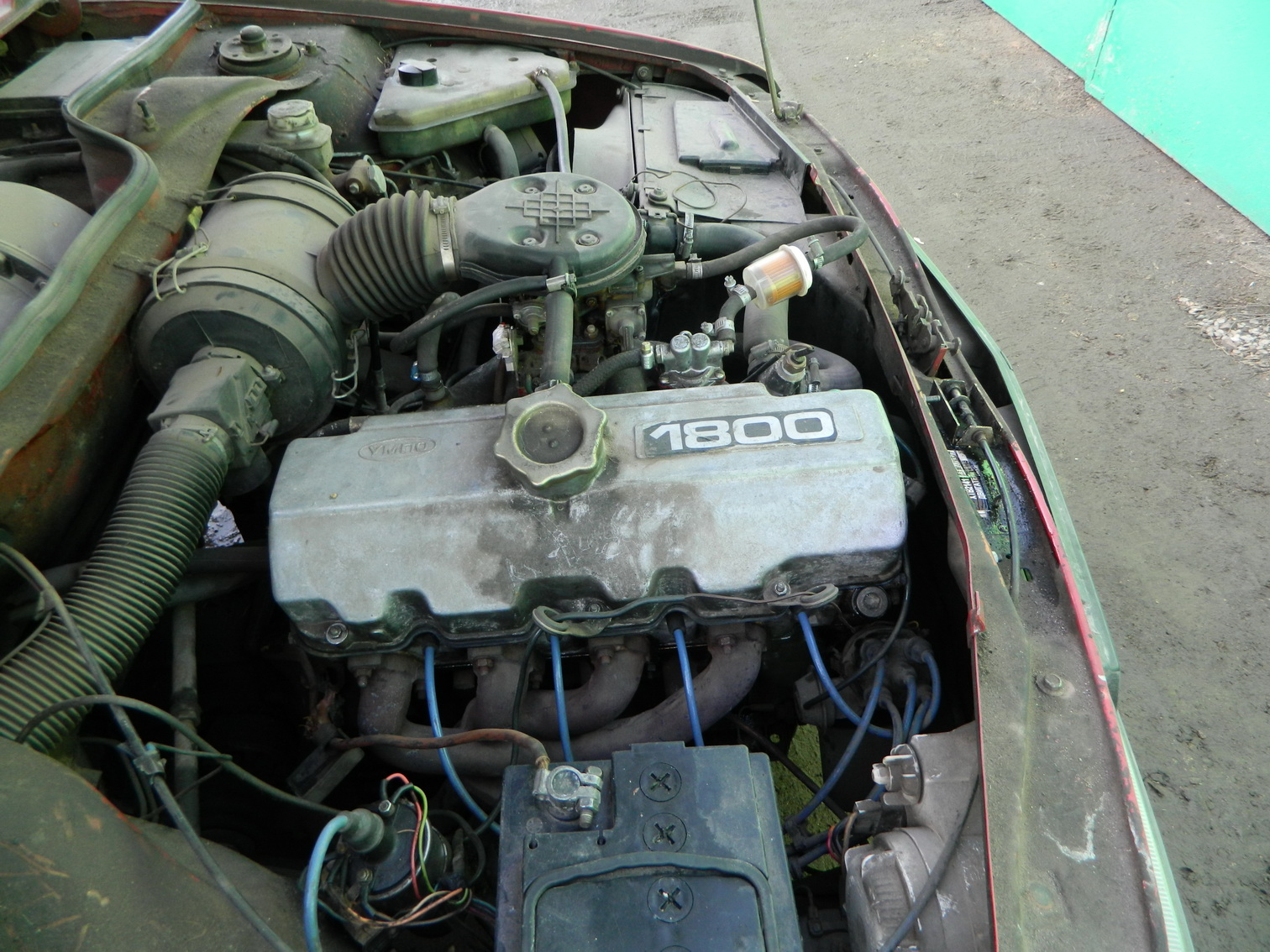 Двигатель УЗАМ 3318 под капотом Москвич Святогор 214123 2000 года выпуска.